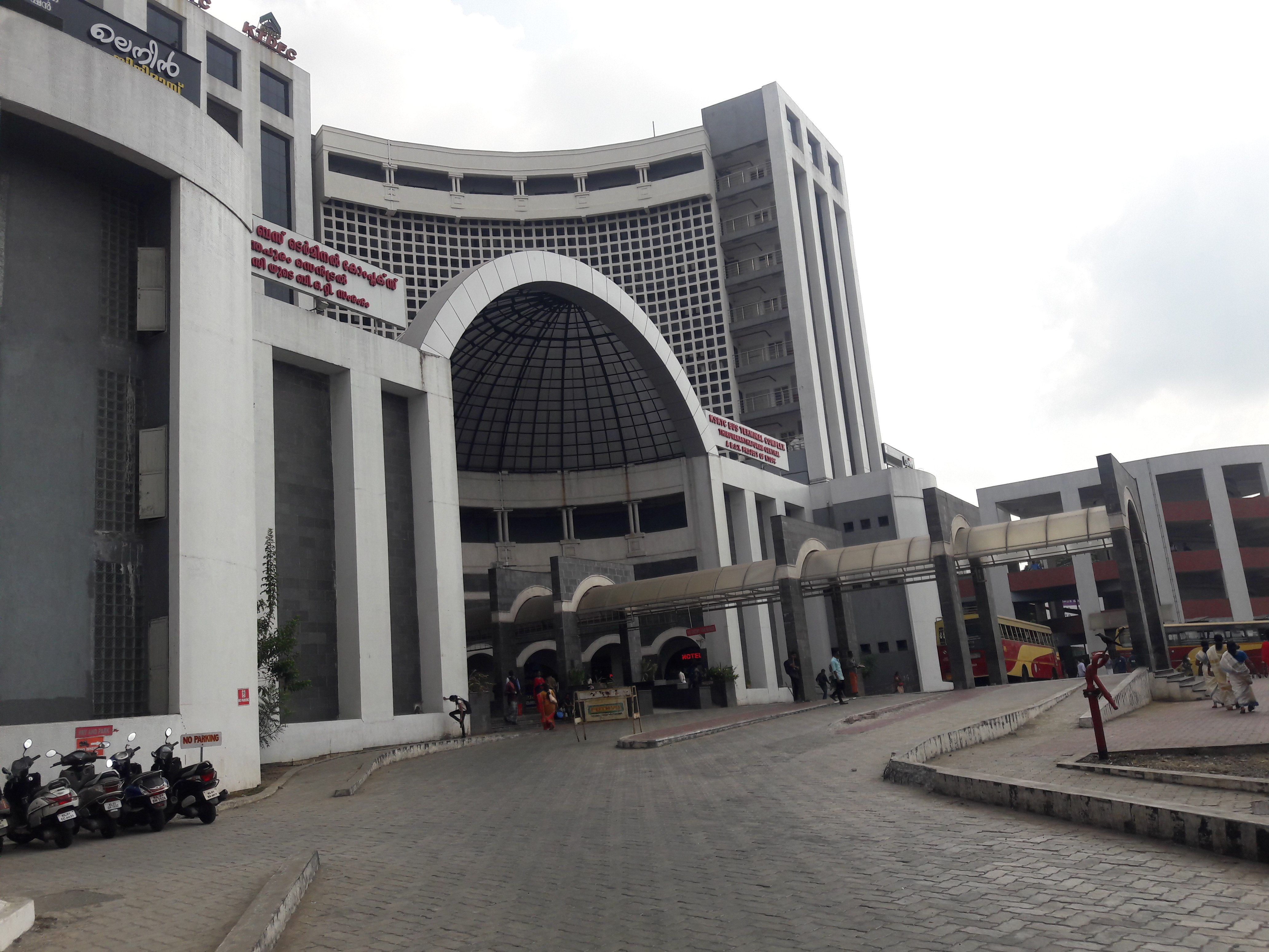 കേരള സ്റ്റേറ്റ് റോഡ് ട്രാൻസ്പോർട്ട് കോർപ്പറേഷൻ തിരുവനന്തപുരം.